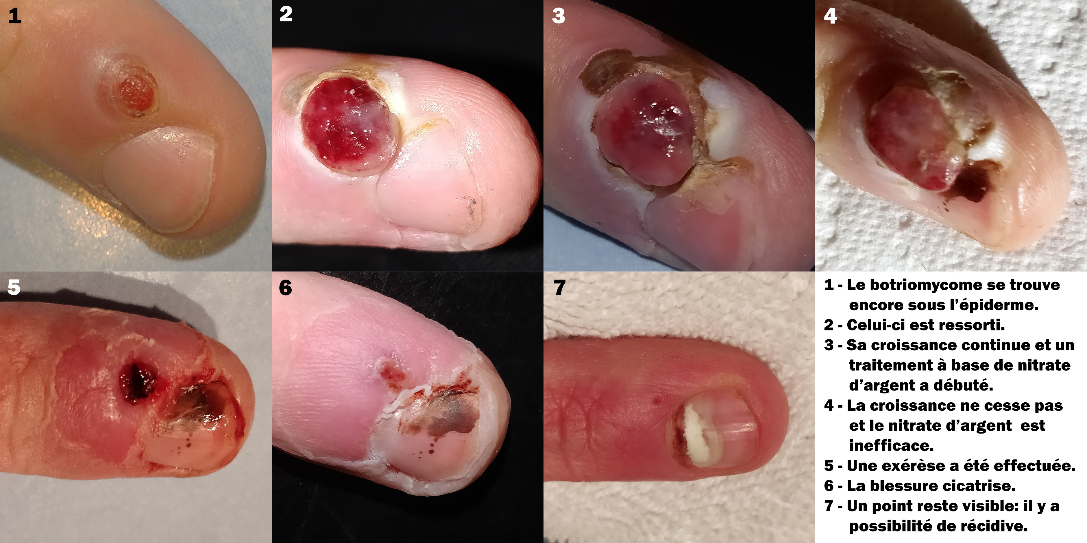 Exemple possible d'une évolution de botriomycome.